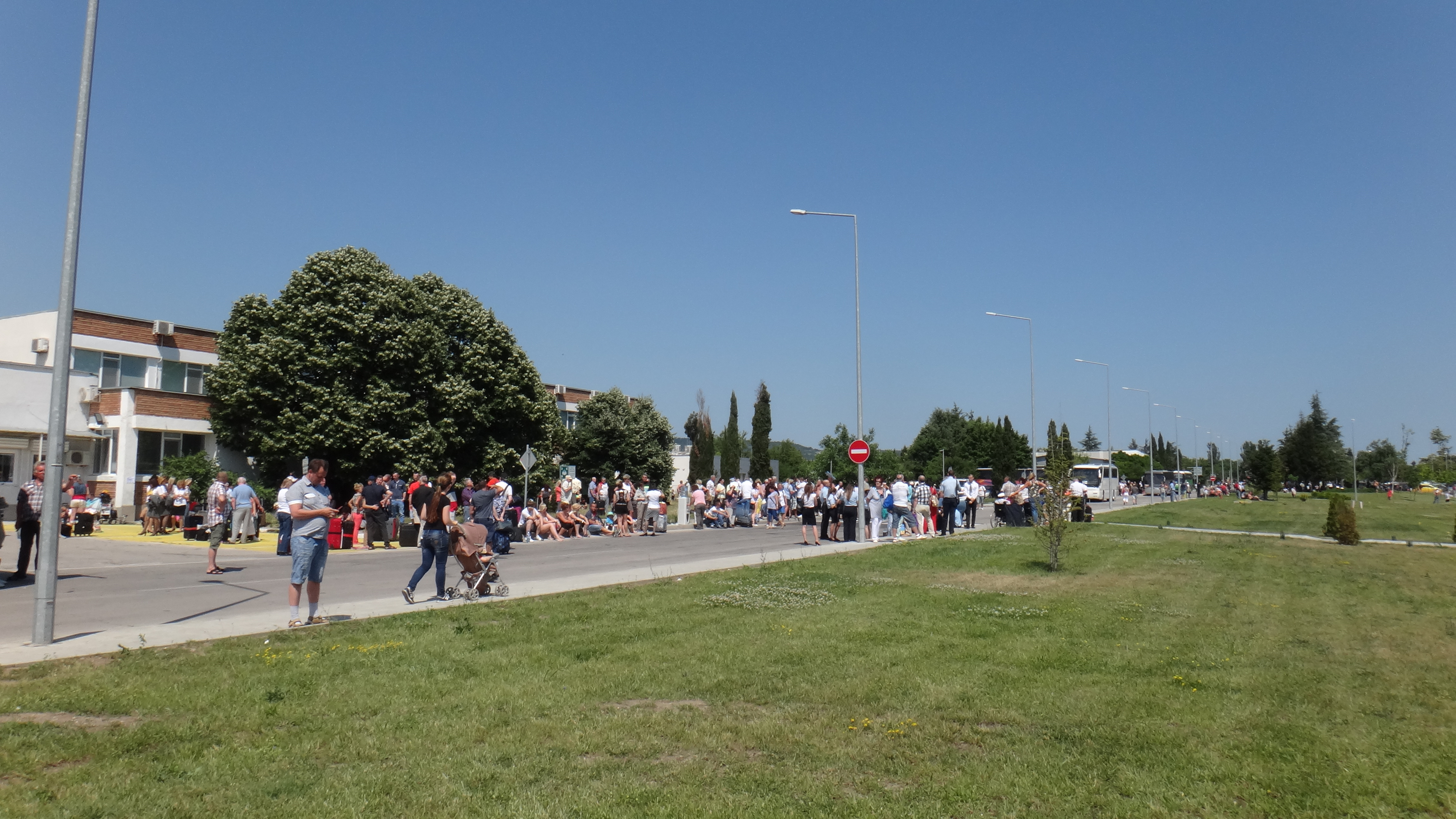 Aksakovo, Bulgaria